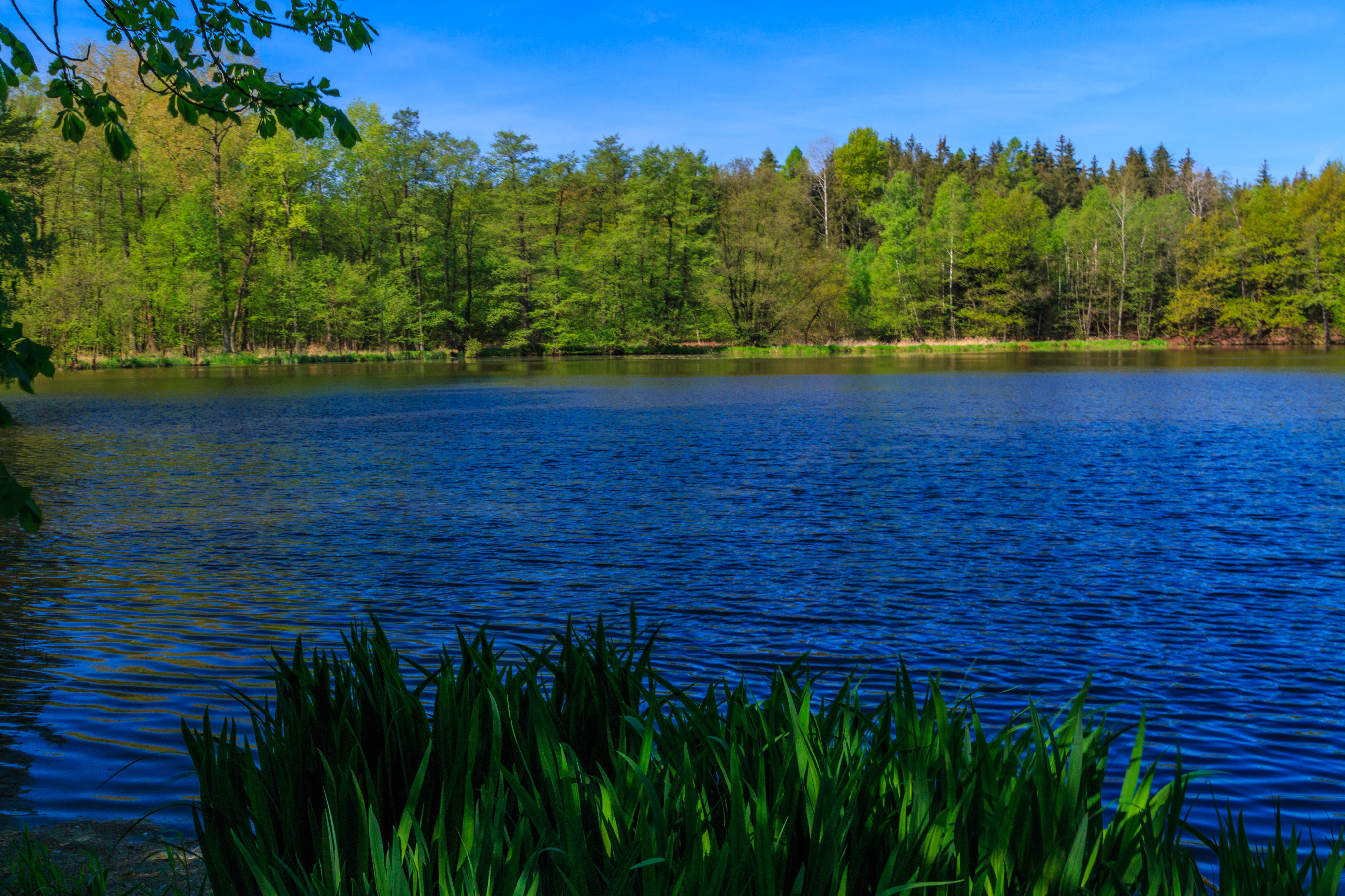 Rybník Zabloudil u osady Ledec Project: Vodstvo.